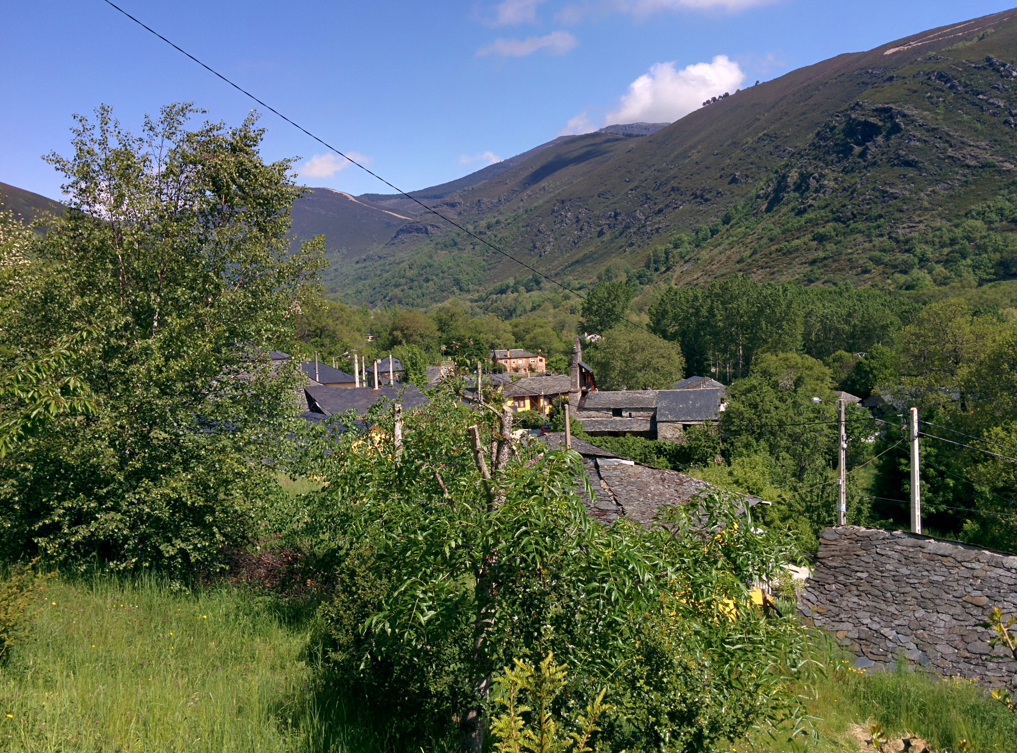 Vista parcial de Pereda de Ancares, en el municipio de Candín (León, España).